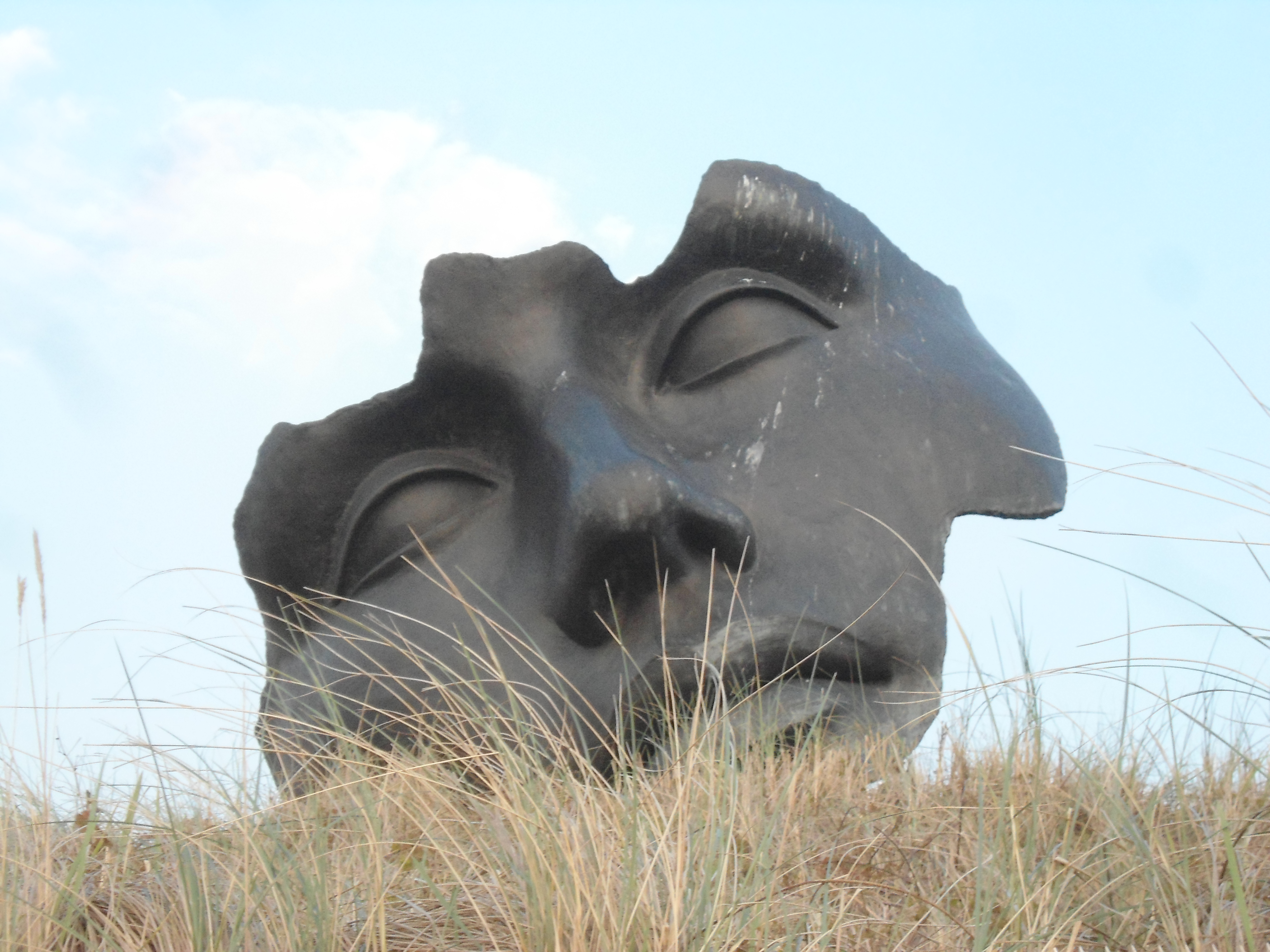 Zicht op Beelden aan Zee in Scheveningen